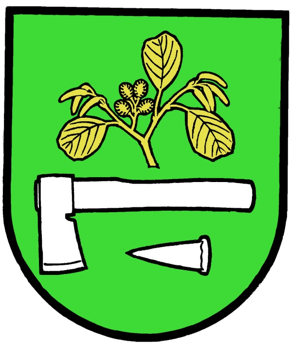 Erb Vyšnej Olšavy